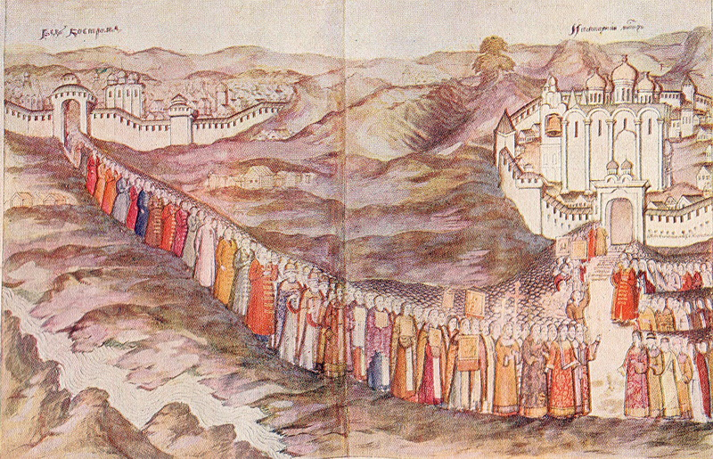 Святитель Феодорит Рязанский во главе посольства Великого Поместного и Земского Собора 1613 года призывает на Царство Михаила Феодоровича Романова Крестный ход костромичей в Ипатьевский монастырь 14 марта 1613 года. Миниатюра из «Книги об избрании на царство на превысочайший престол великаго российскаго царствия Великаго Государя и Великаго Князя Михаила Феодоровича всея великия России Самродержца. 1673 год»